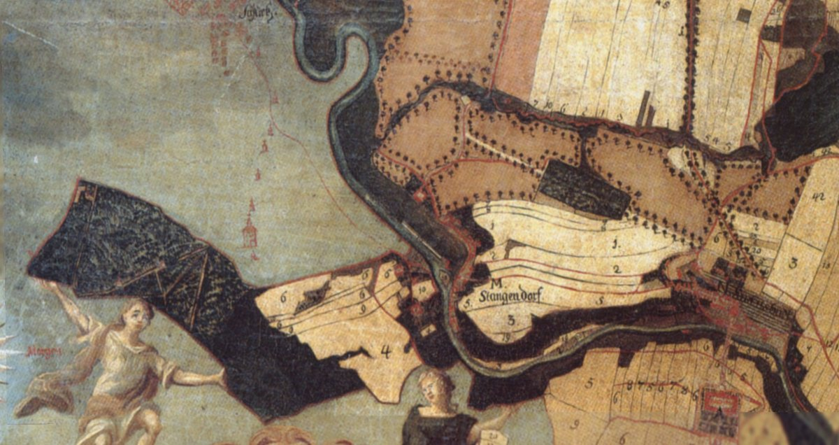 Detail mapy Panství Choustníkovo Hradiště z roku 1754, olej na plátně, 225 x 197 cm, Expozice Národního zemědělského muzea na zámku Ohrada u Hluboké nad Vltavou